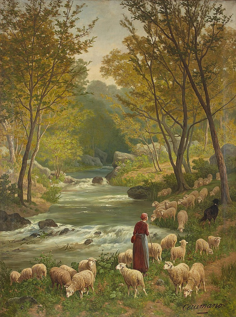 Bergère au bord de l'eau